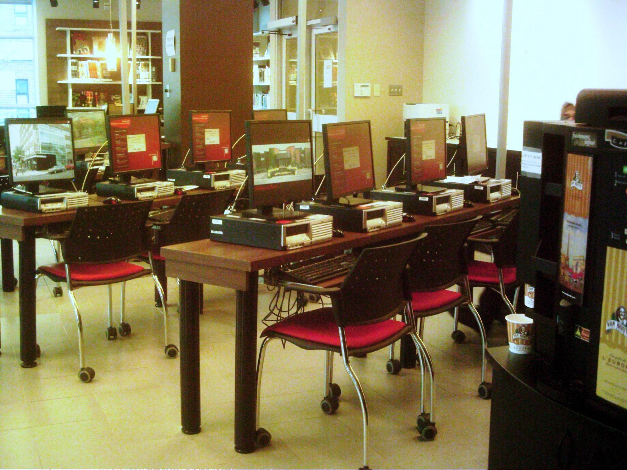 Intérieur du Café de Da, un café Internet attenant à la bibliothèque Ahuntsic, bibliothèque publique de Montréal. Da est le prénom de la grand-mère de l'écrivain Dany Laferrière.